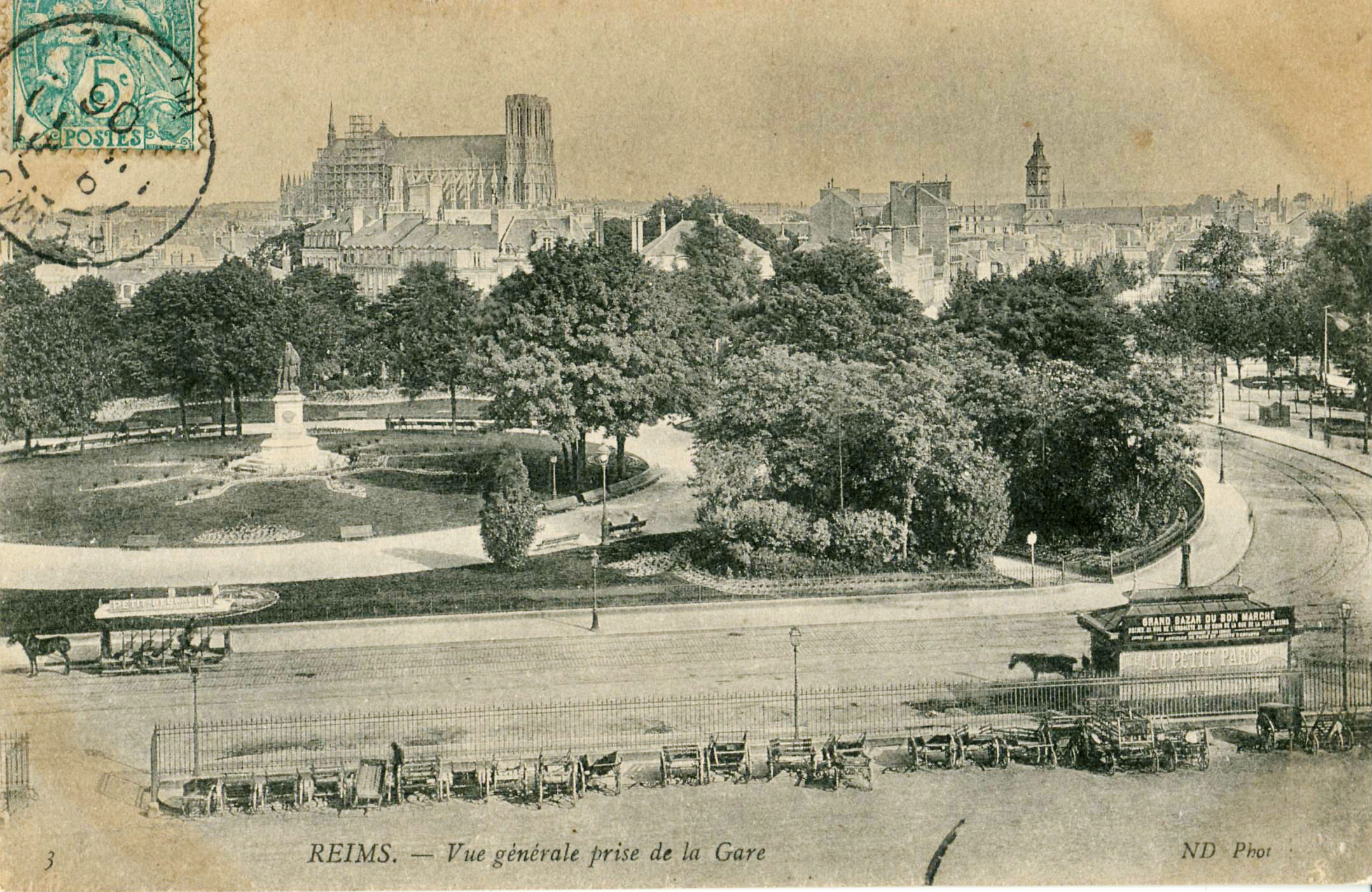 Carte postale ancienne éditée par ND,n°3 :REIMS - Vue générale prise de la Gare